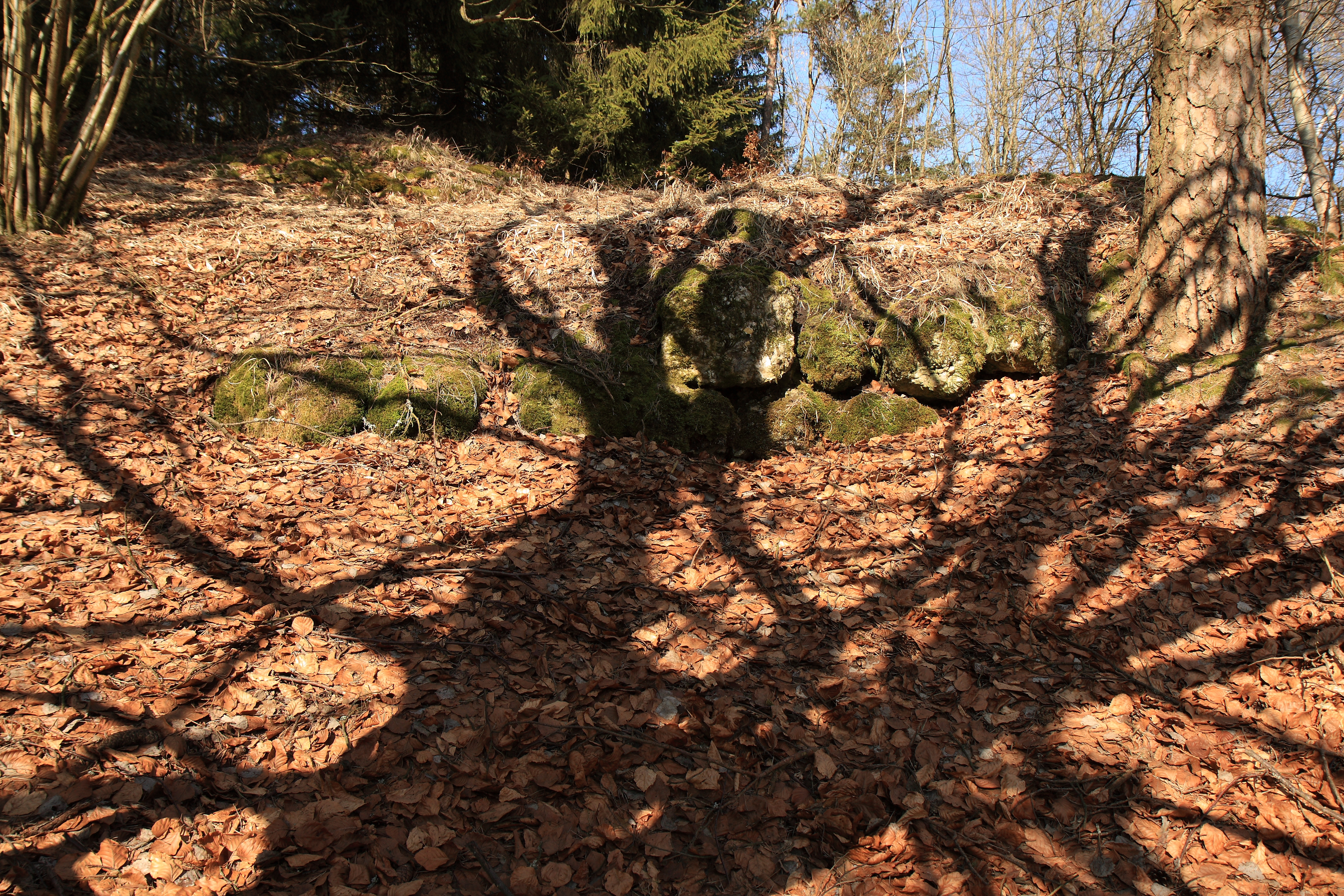 Letzter Mauerrest des Burgstalls Alte Bürg